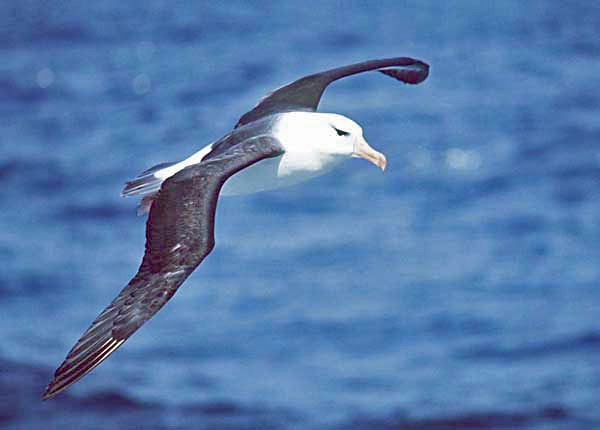 Beschreibung: Schwarzbrauenalbatros (Thalassarche melanophris) Fotograf: Uwe Kils